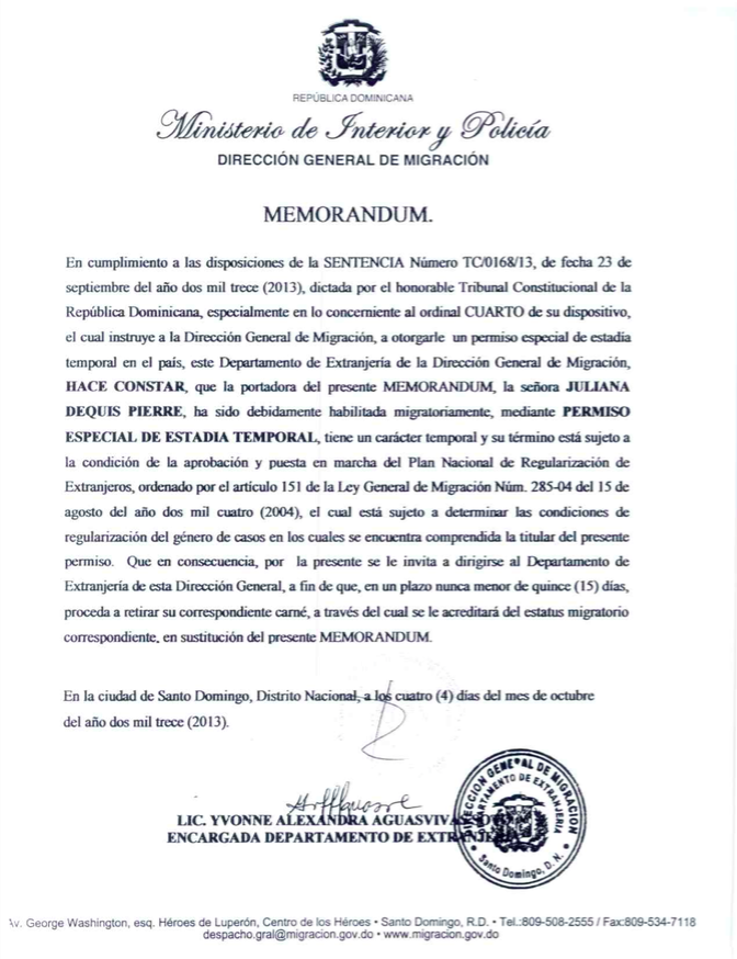 Memorandum Dirección General de Migración Juliana Deguis